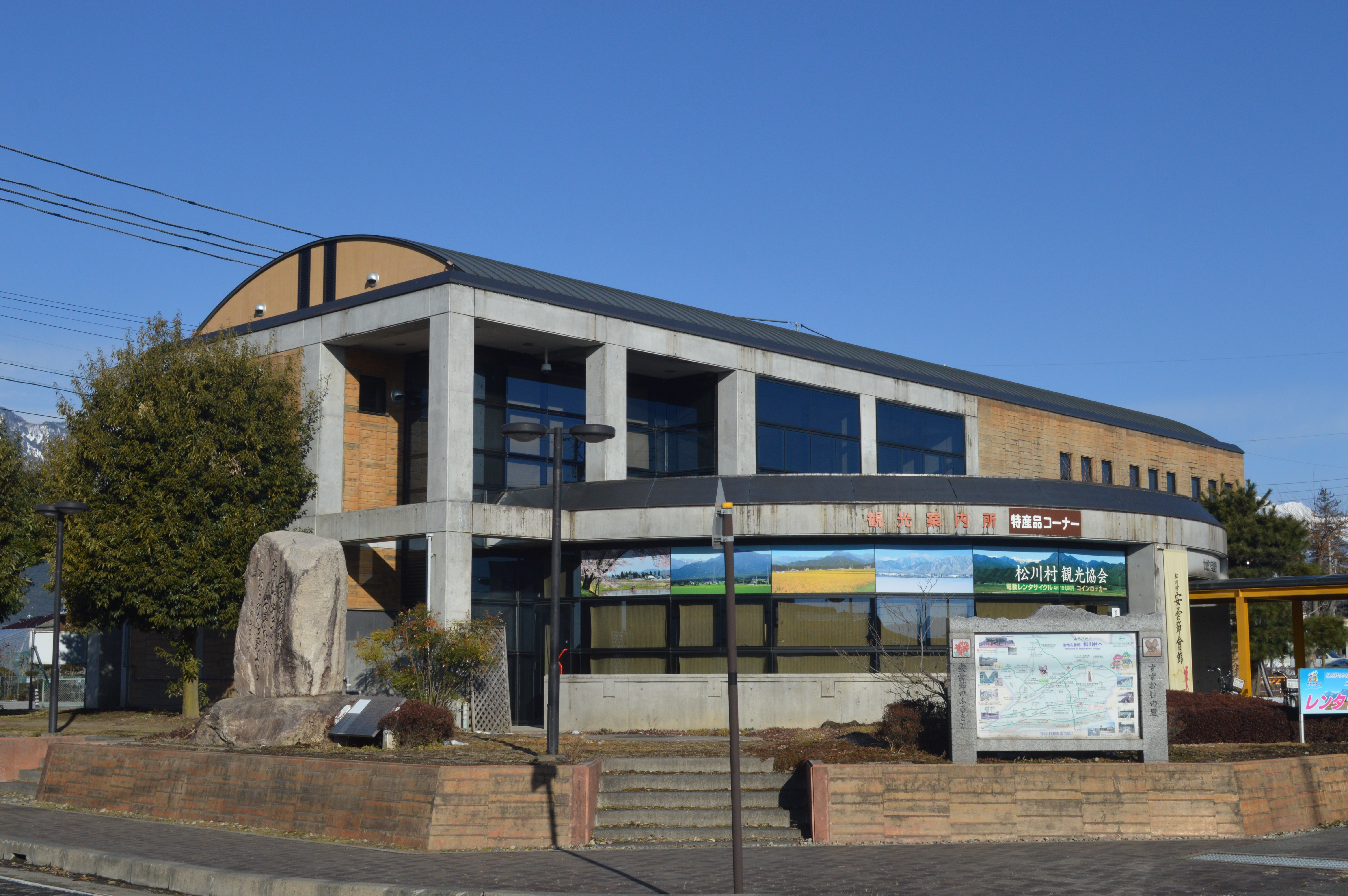 長野県北安曇郡松川村にあるセピア安曇野。松川村観光協会、安曇節会館などが入っている。